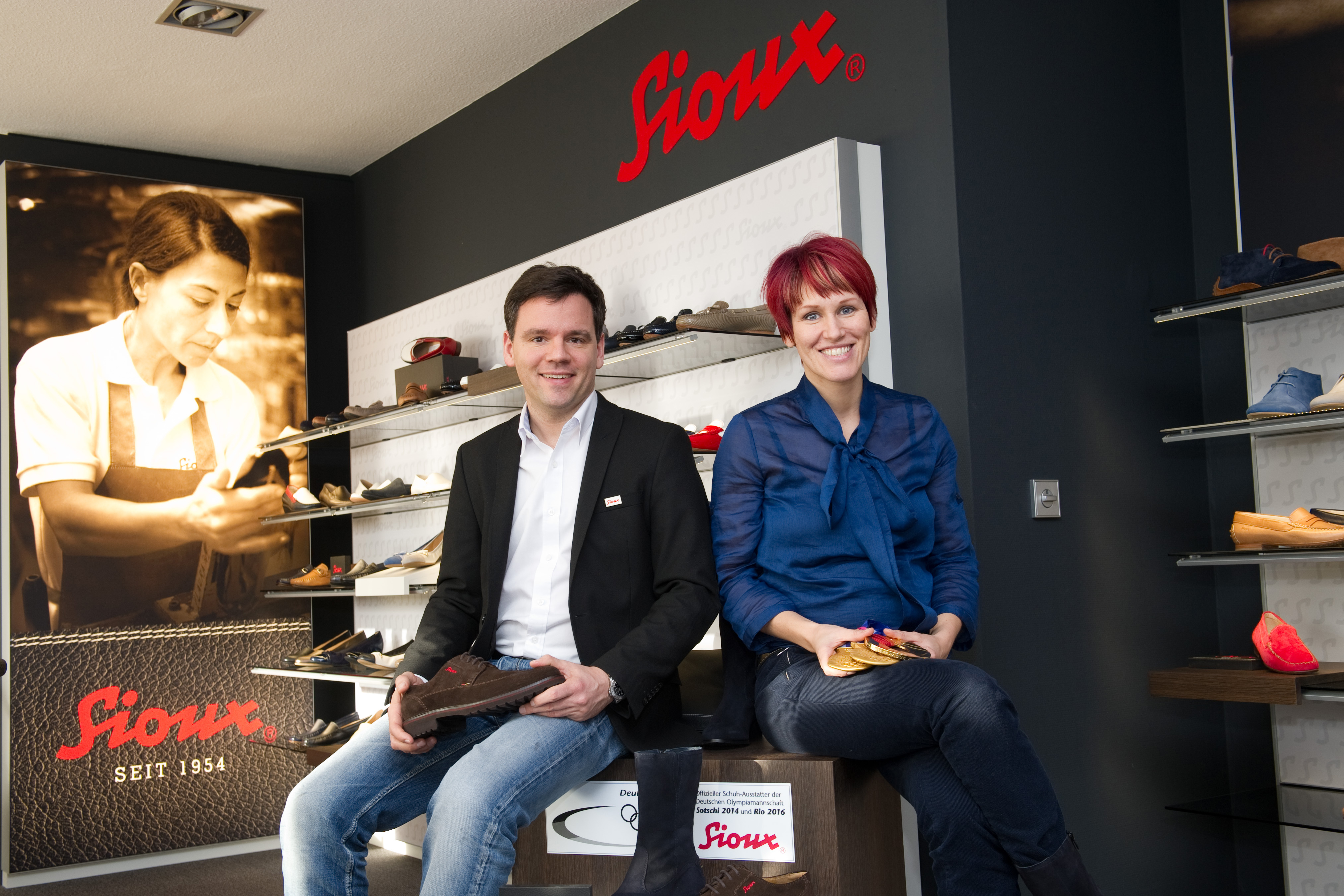 Sioux Markenbotschafterin Kati Wilhelm bei ihrem Besuch in Walheim mit Sioux CEO Lewin Berner.